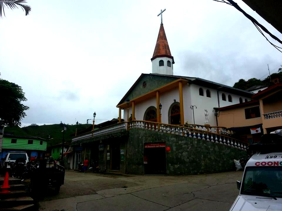 Esta fotografía fue tomada en el municipio colombiano con código 05107.